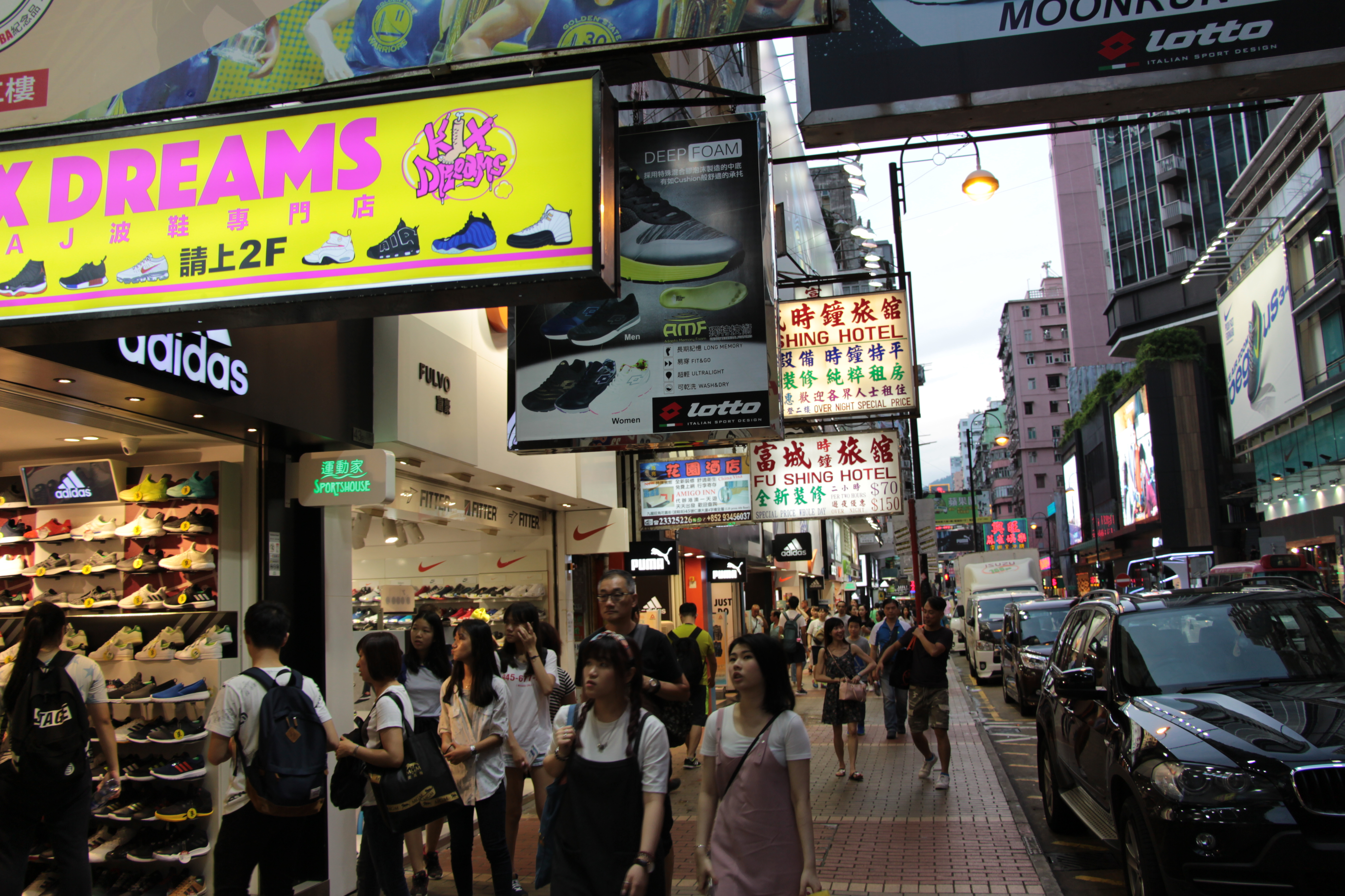 Beliebte Einkaufsstraße in Mong Kok, Hongkong, bestehend vor allem aus Sneaker-Geschäften